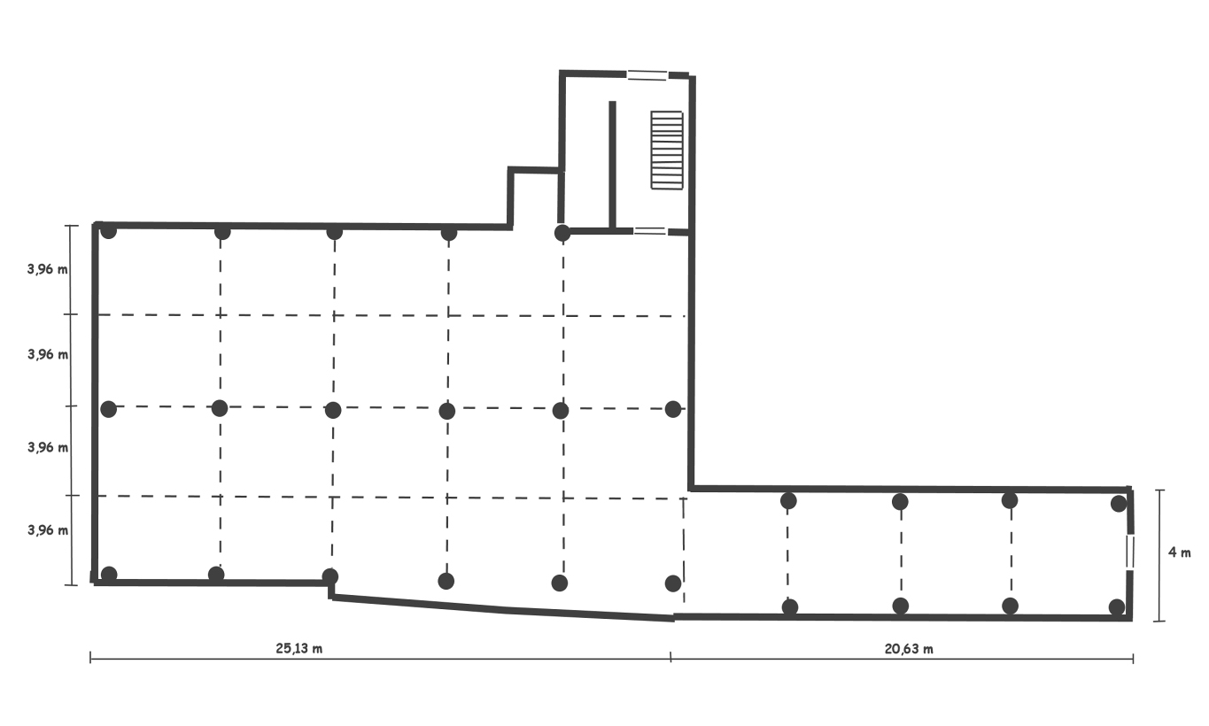 AMCO-Fabrikerweiterungsgebäude, Grundriss im Erdgeschoss, Zeichnung nach Vorlage